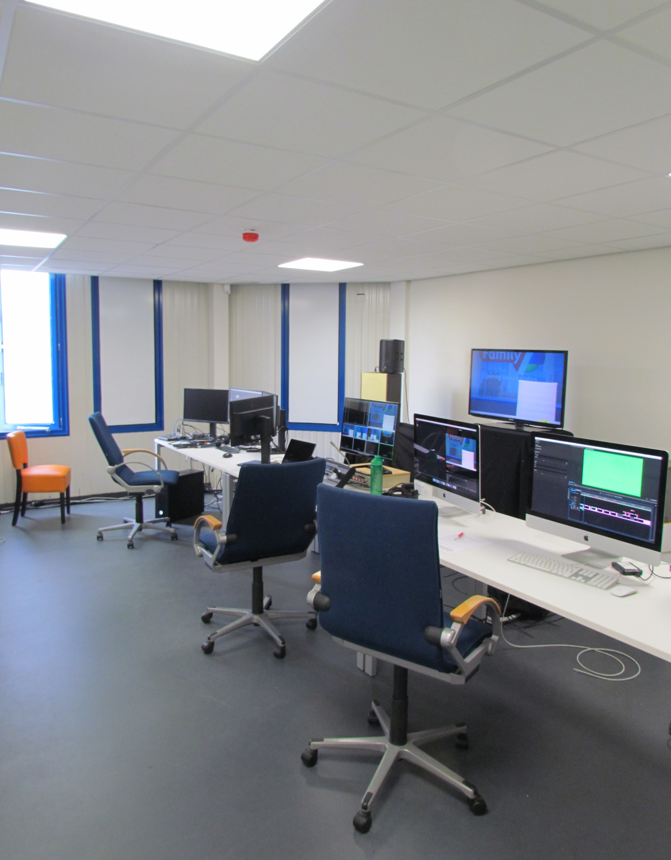 Regieruimte van de Nederlandse televisiezender Family7